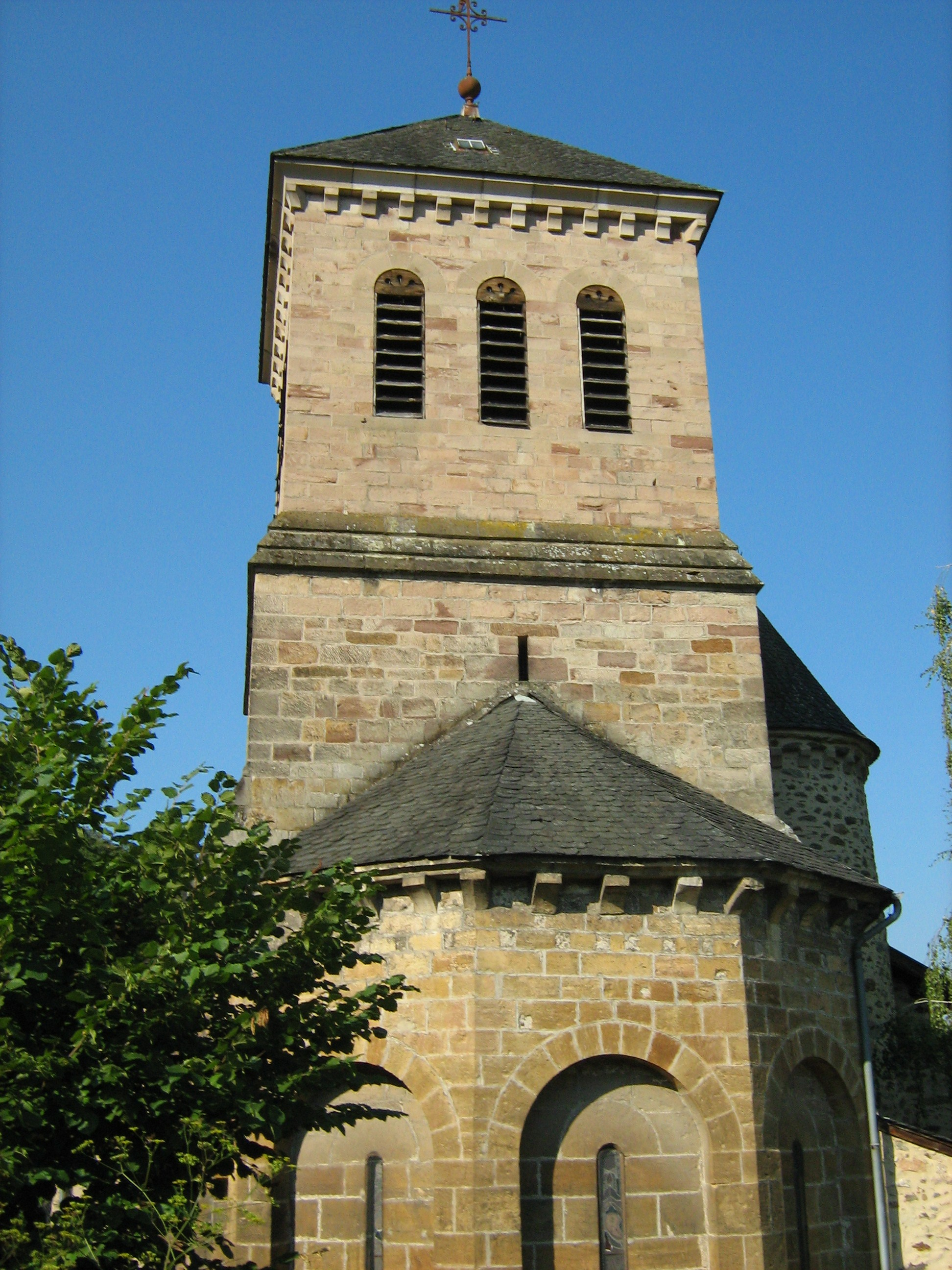 Eglise de Saint-Martin de Bouillac commune de Bouillac (Aveyron), classée Monument historique